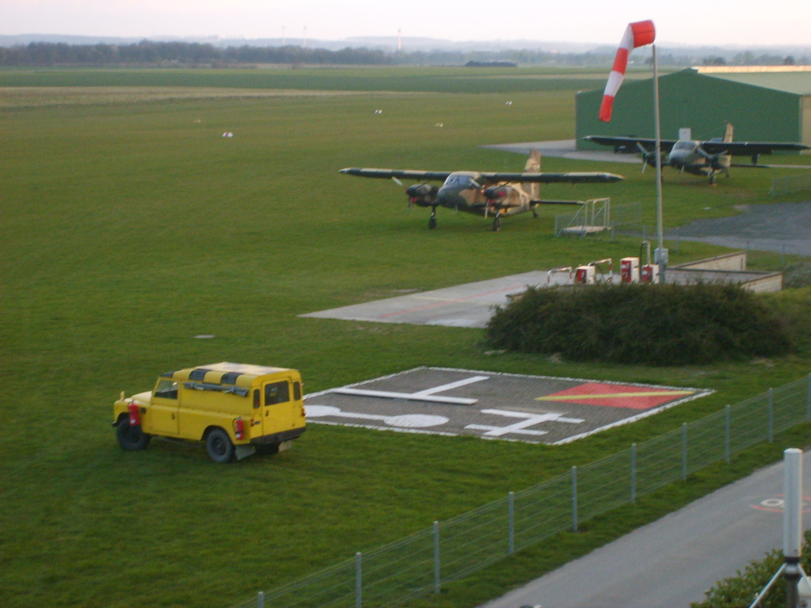 Feuerwehr, Windsack, Tankstelle - Flugplatz_Soest-Bad_Sassendorf.